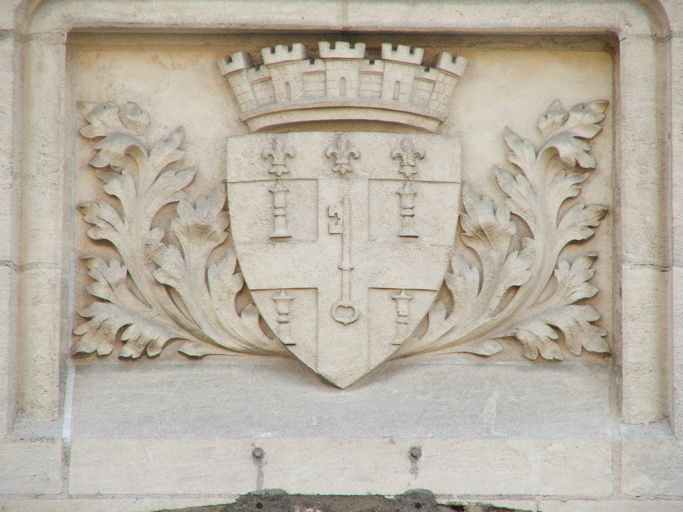 Blason du Mans incrusté dans une maison de la vieille ville avec au dessus, les remparts, symboles des armoiries de la ville.